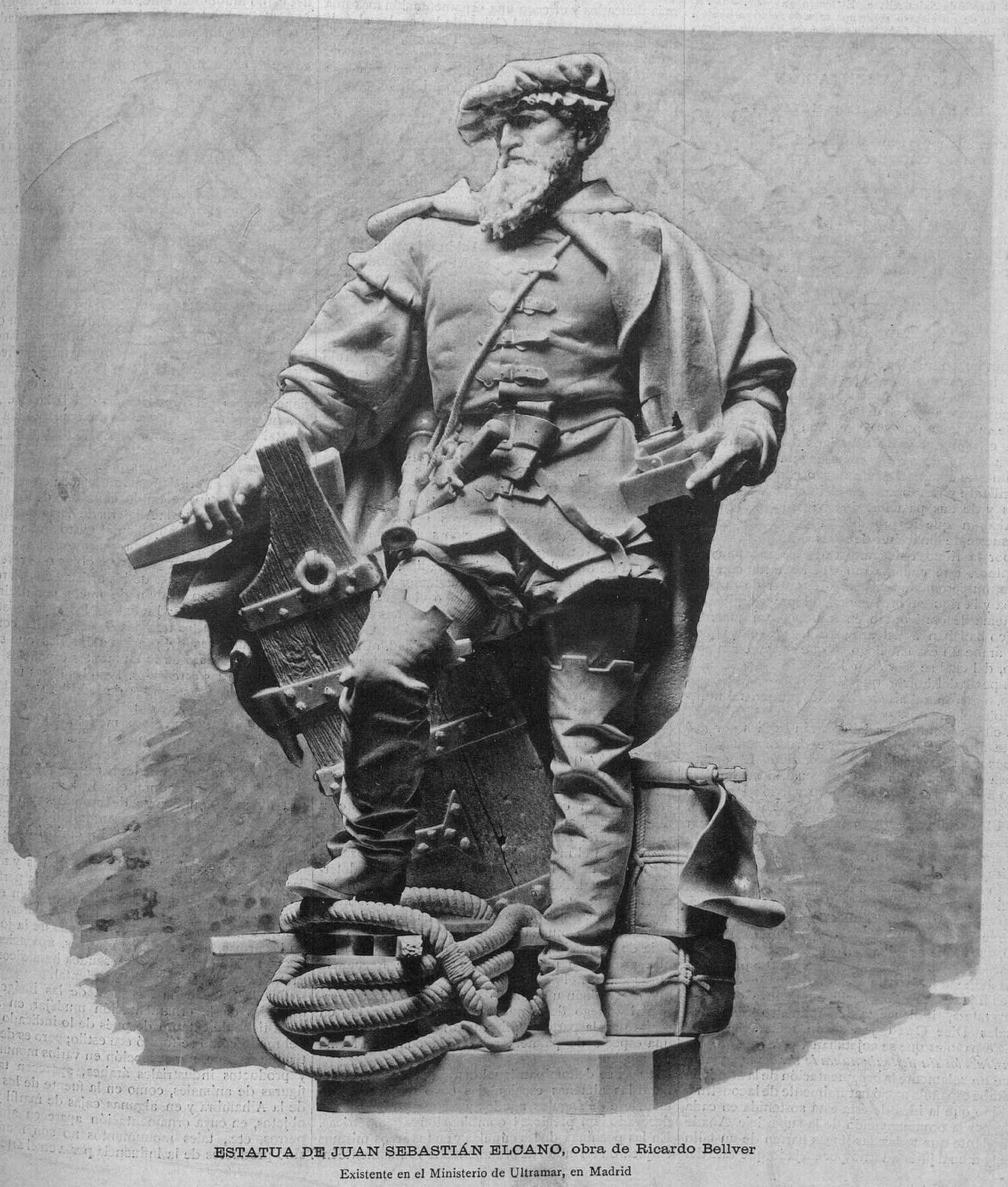 Estatua de Juan Sebastián Elcano, obra de Ricardo Bellver. Existente en el Ministerio de Ultramar, en Madrid, en La Ilustración Artística.